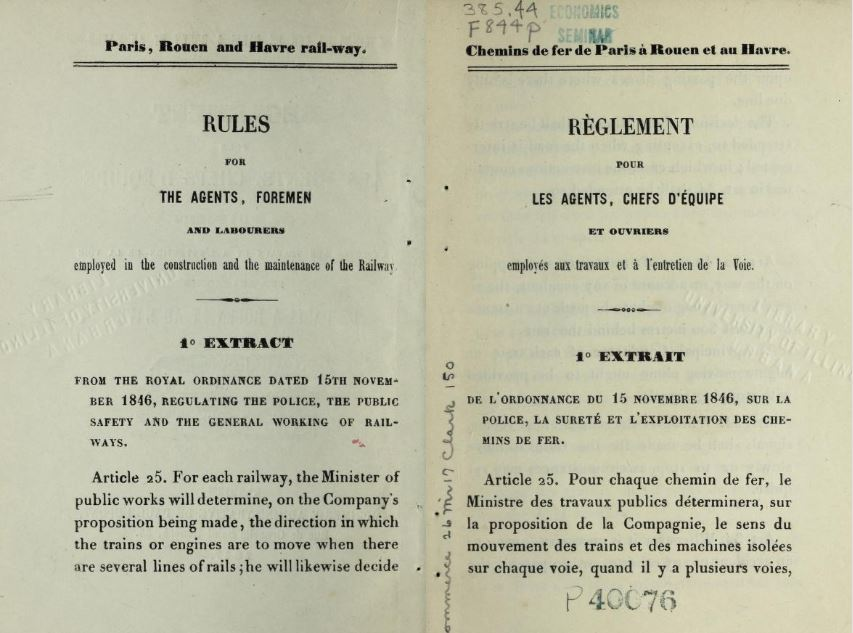 Règlement anglais-français pour les agents, chefs d'équipe et ouvriers du chemin de ferde Paris à Rouen et au Havre